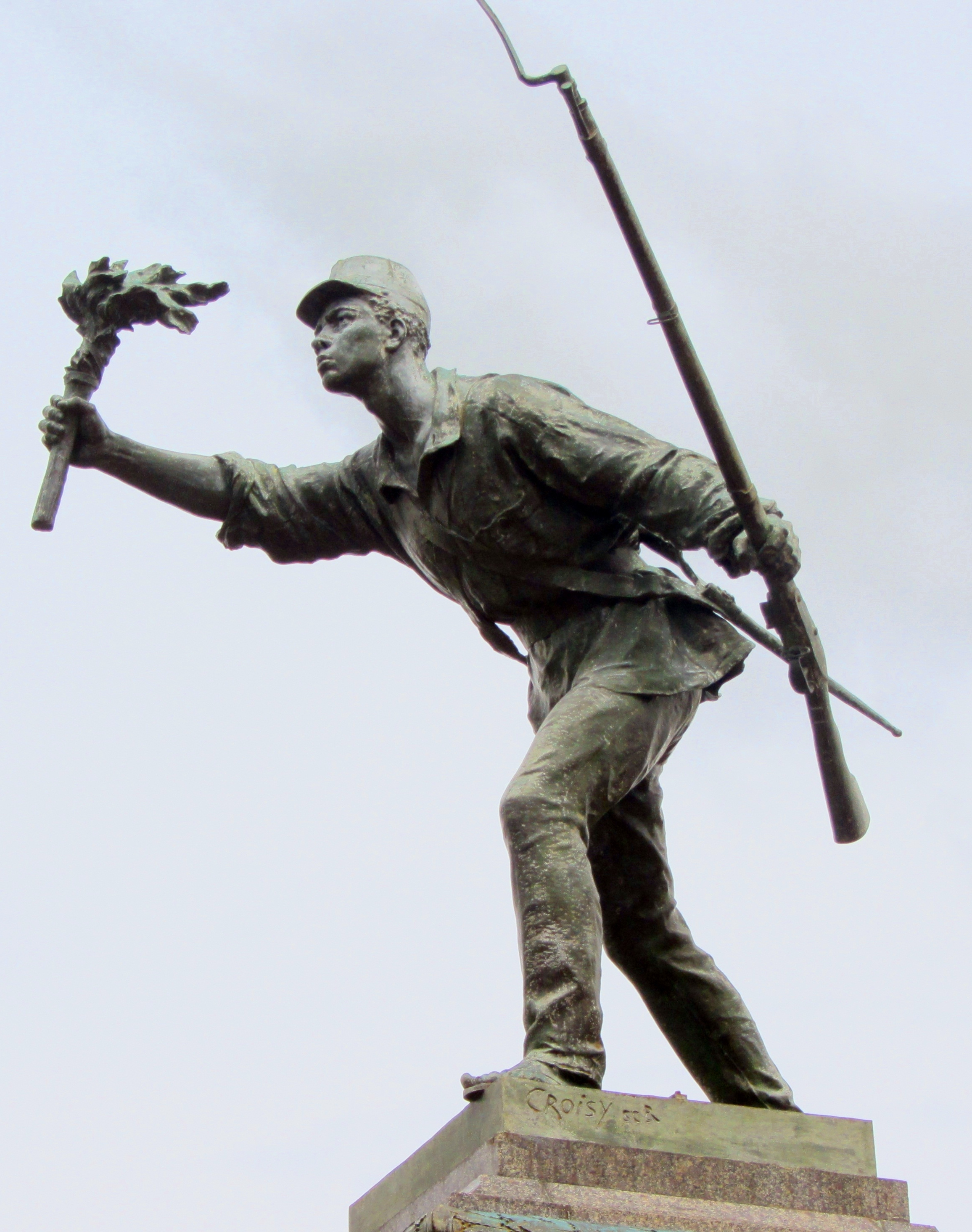 Estatua en honor a Juan Santamaría, escultura del laureado escultor francés Aristide Croisy (1840 1899). Develada en la ceremonia del 15 de septiembre de 1891. Ubicada en Alajuela, Costa Rica. Imagen elaborada a partir de una foto de Rodrigo Fernández tomada de Wikicommons.